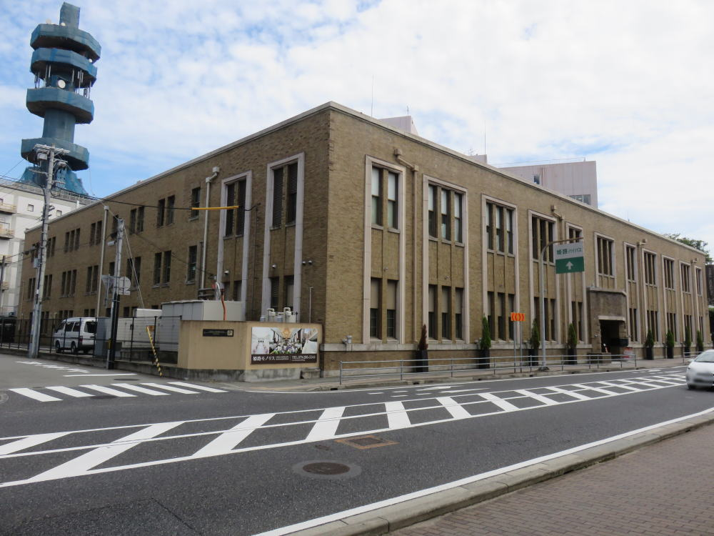 兵庫県姫路市。姫路モノリス（旧：逓信省姫路電信局別館、NTT西日本兵庫支店姫路2号館）。